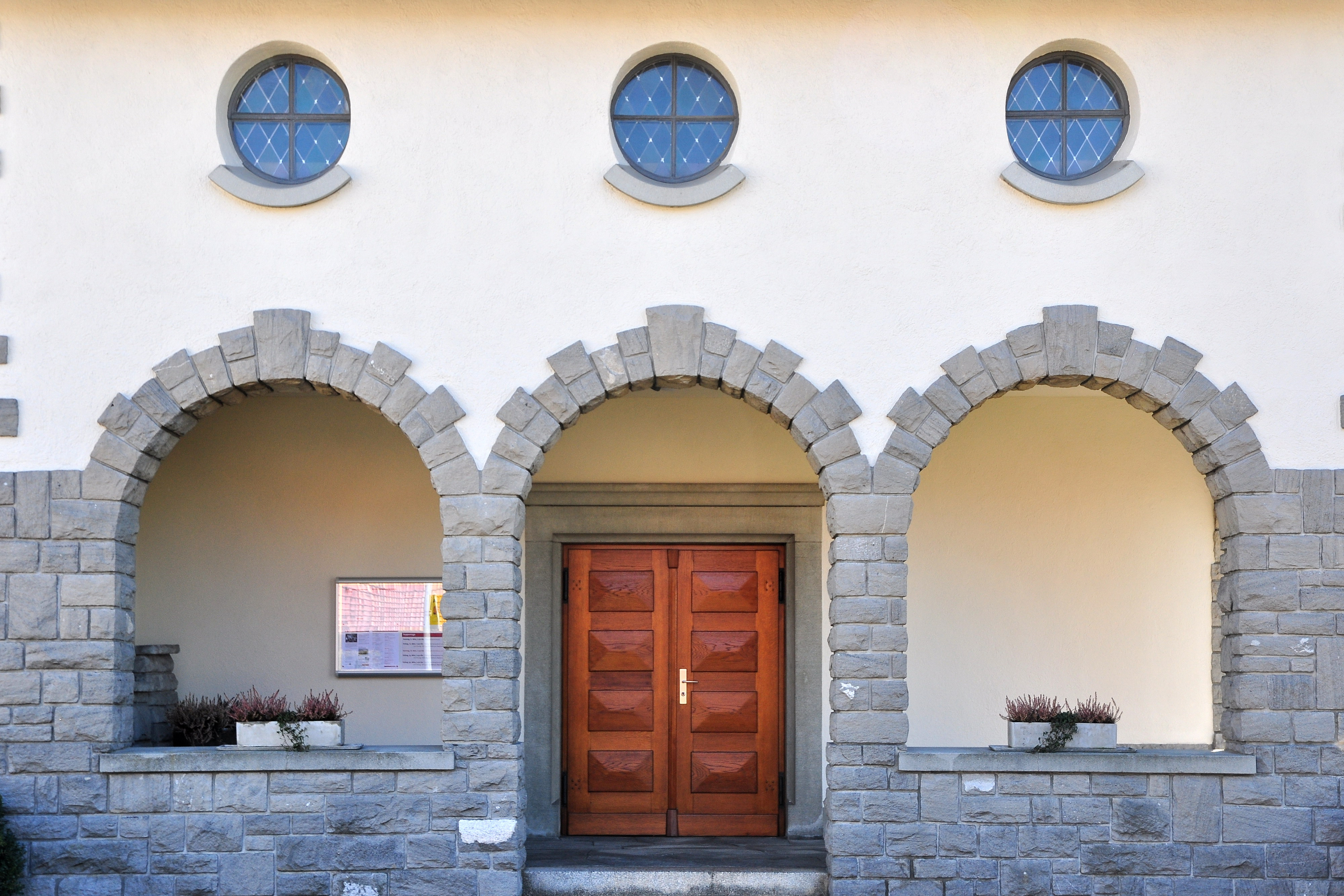 Wagen in Jona (Switzerland)